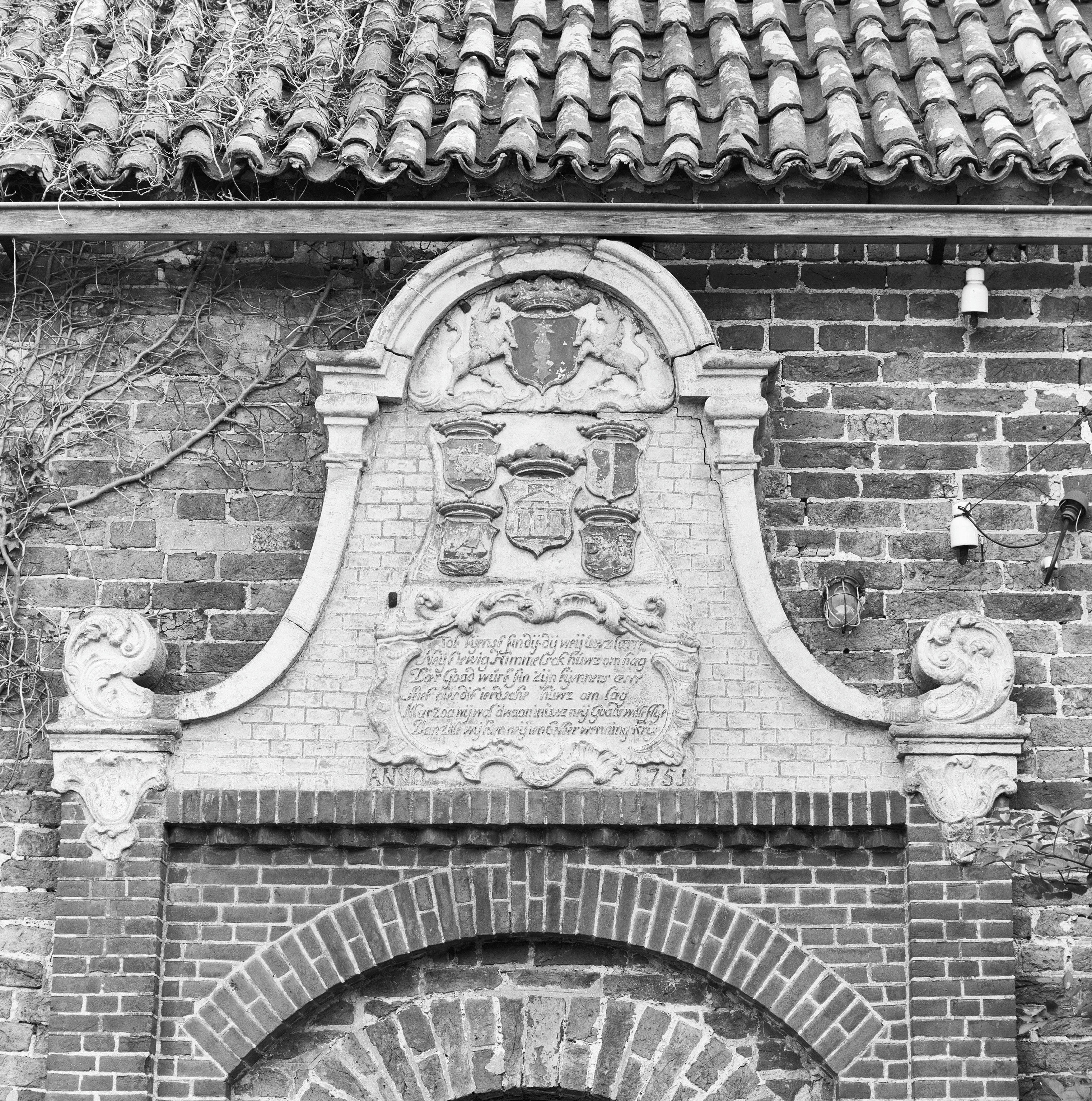 N.H.Kerk: top ingangspartij noordzijde